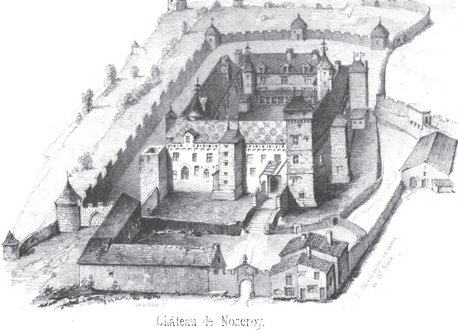 Gravure représentant le château de Nozeroyt